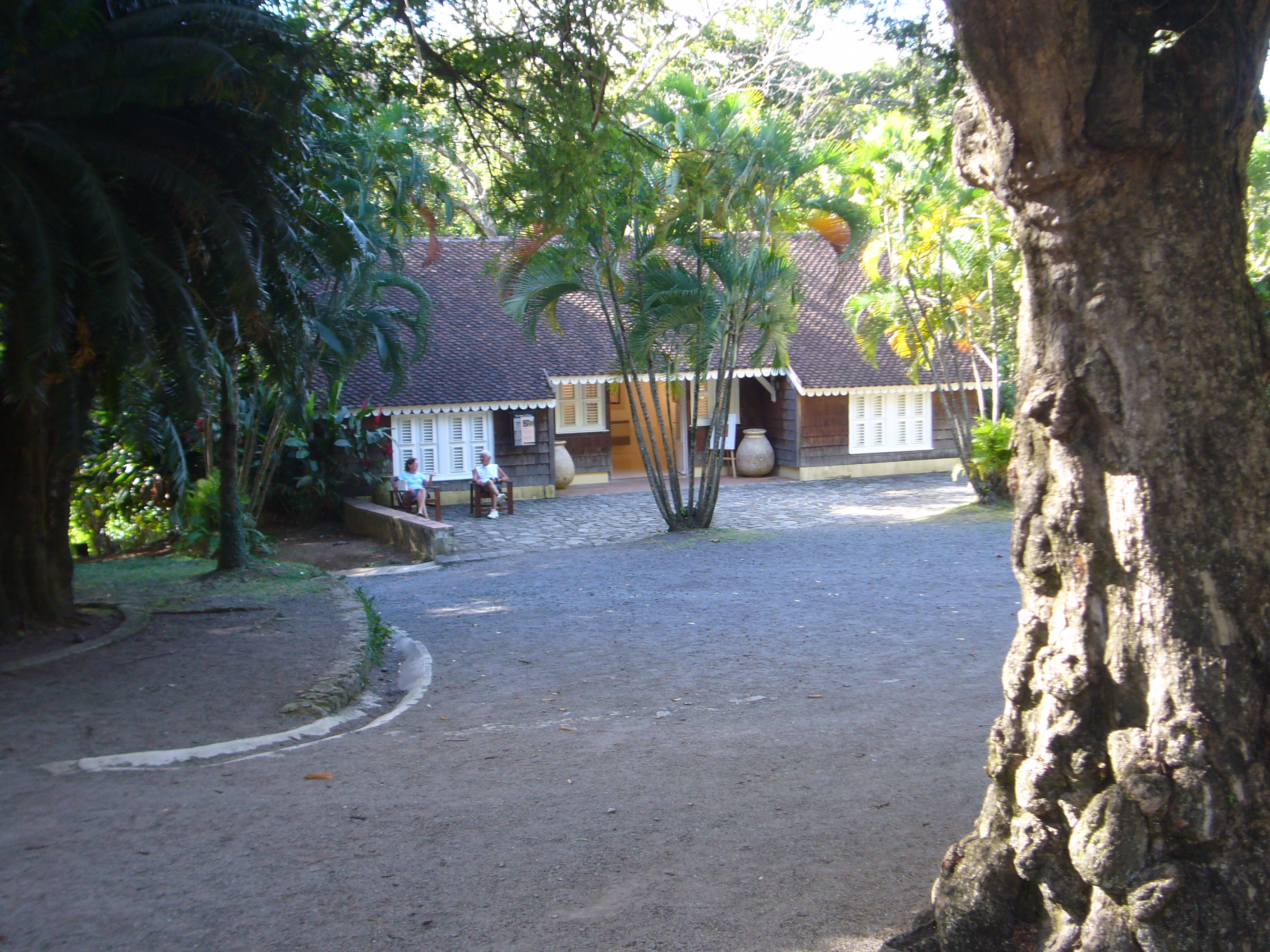 Martinique, Habitation Clément, View from outside